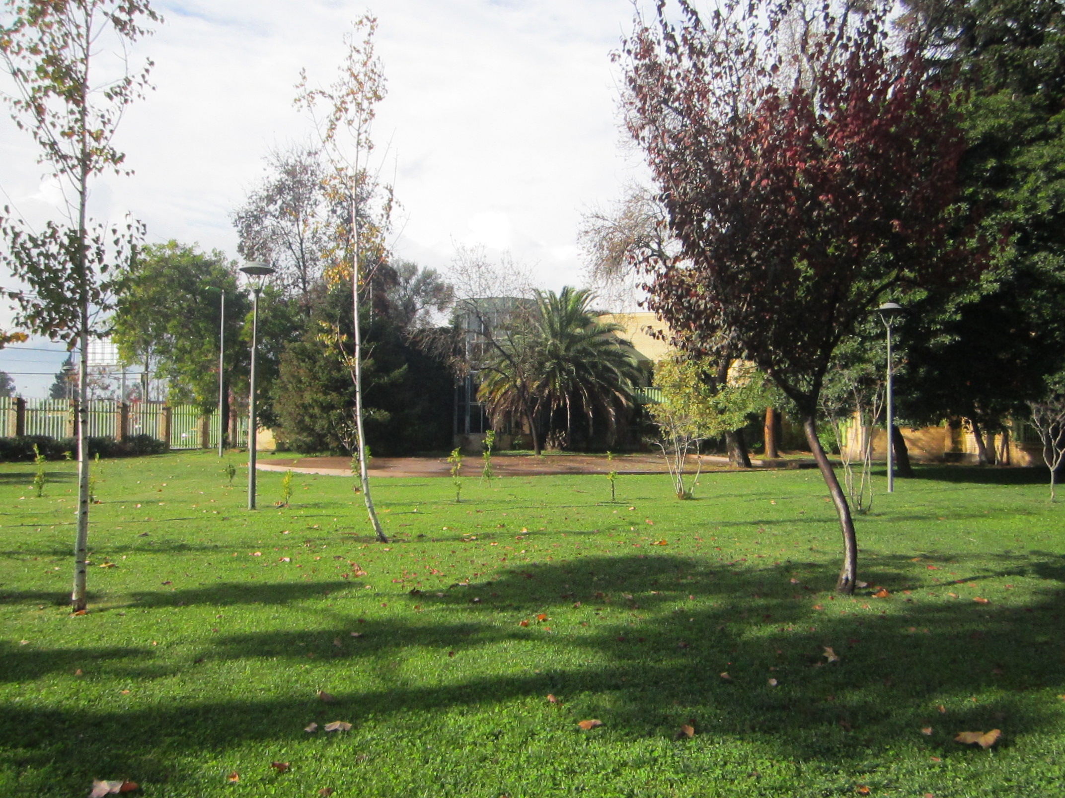 Vista hacia el edificio consistorial de la Ilustre Municipalidad de La Granja, desde la plaza cívica comunal. La Granja, Santiago de Chile.